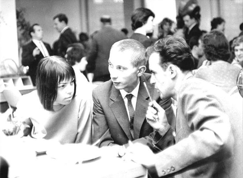 Zentralbild-Franke tre-wo. 14.11.1964 Berliner Jugend mit über 30 Schriftstellern beim Literaturfestival. Zum Rendezvous mit über 30 prominenten Schriftstellern saßen am 14.11.1964 bei einem Eisbecher im Cafe "Forum" Berliner Jungen und Mädchen, begierig, etwas über die Arbeit ihrer Idole zu erfahren. So begann das I. Literaturfestival der Berliner Jugend, zu dem FDJ-Bezirksleitung und Schriftstellerverband eingeladen hatten, im Haus des Lehrers am Alexanderplatz. UBz.: Unter den anwesenden Schriftstellern befand sich das Ehepaar Rainer und Sarah Kirsch (Links und in der Mitte sitzend).